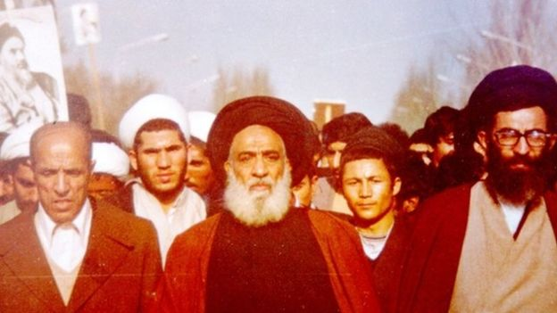 علی خامنه ای، کاظم اخوان مرعشی و طاهر احمدزاده در تظاهرات انقلاب